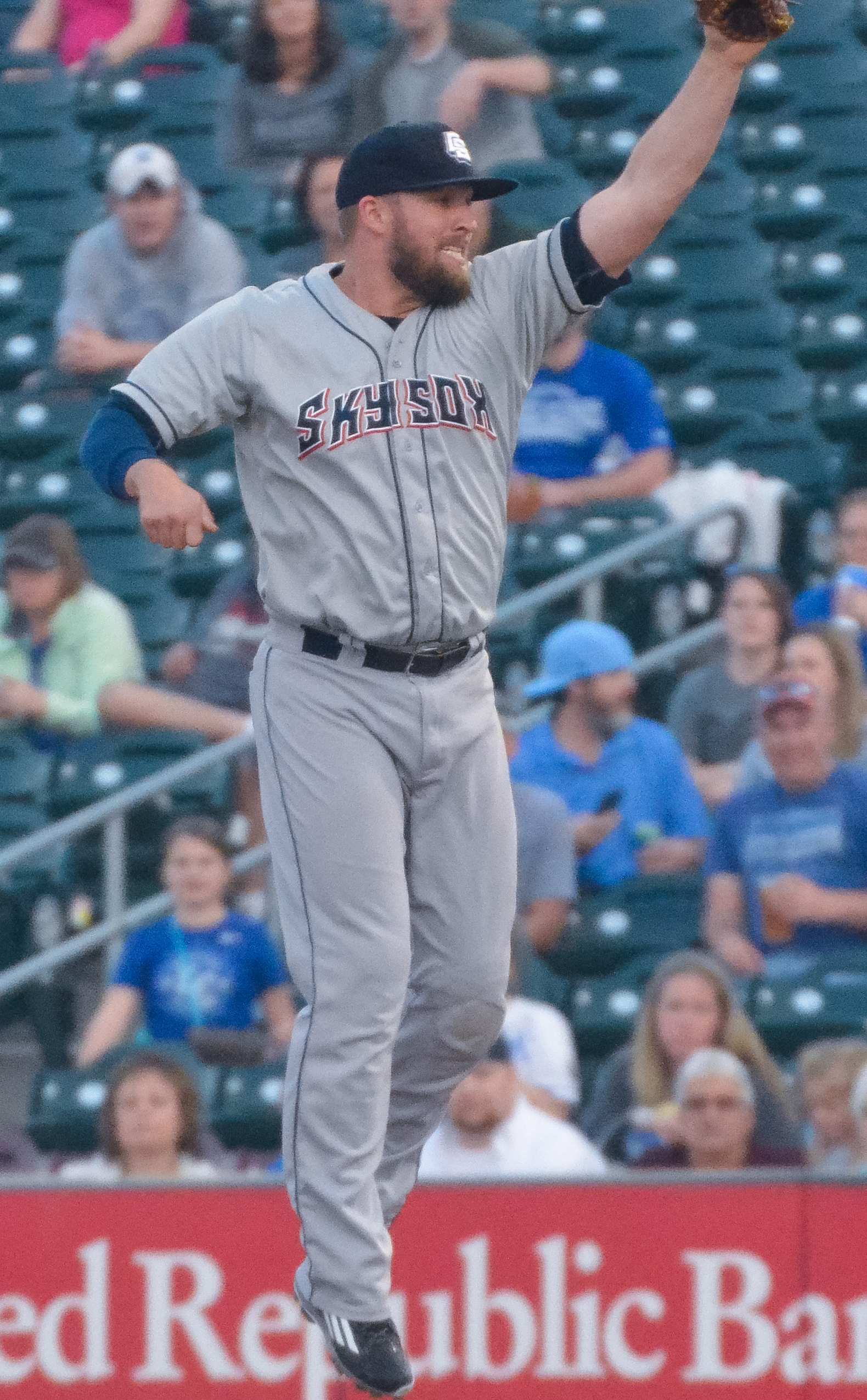 Andy Wilkins